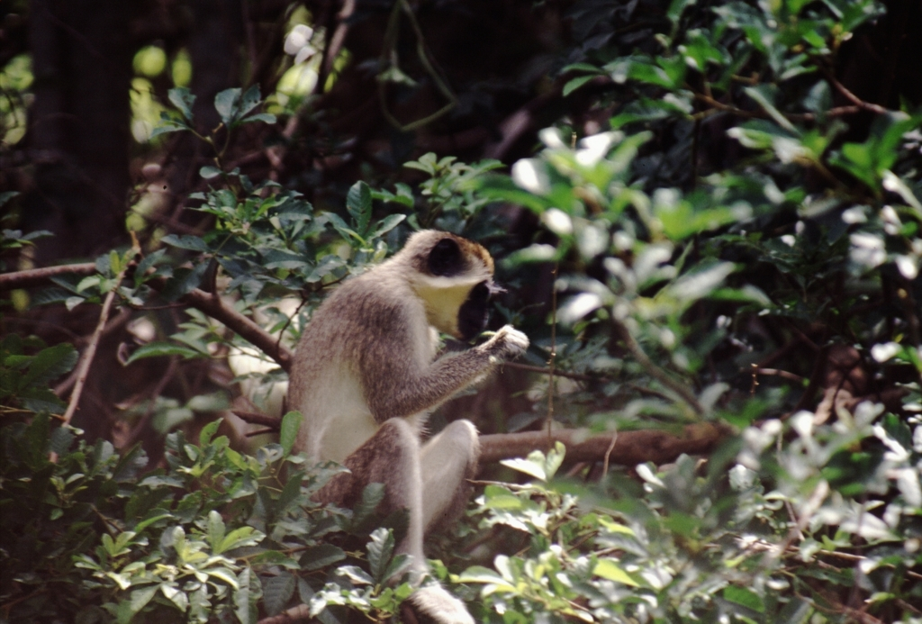 Grüne Meerkatzen (Chlorocebus sabaeus) im Bijilo Park